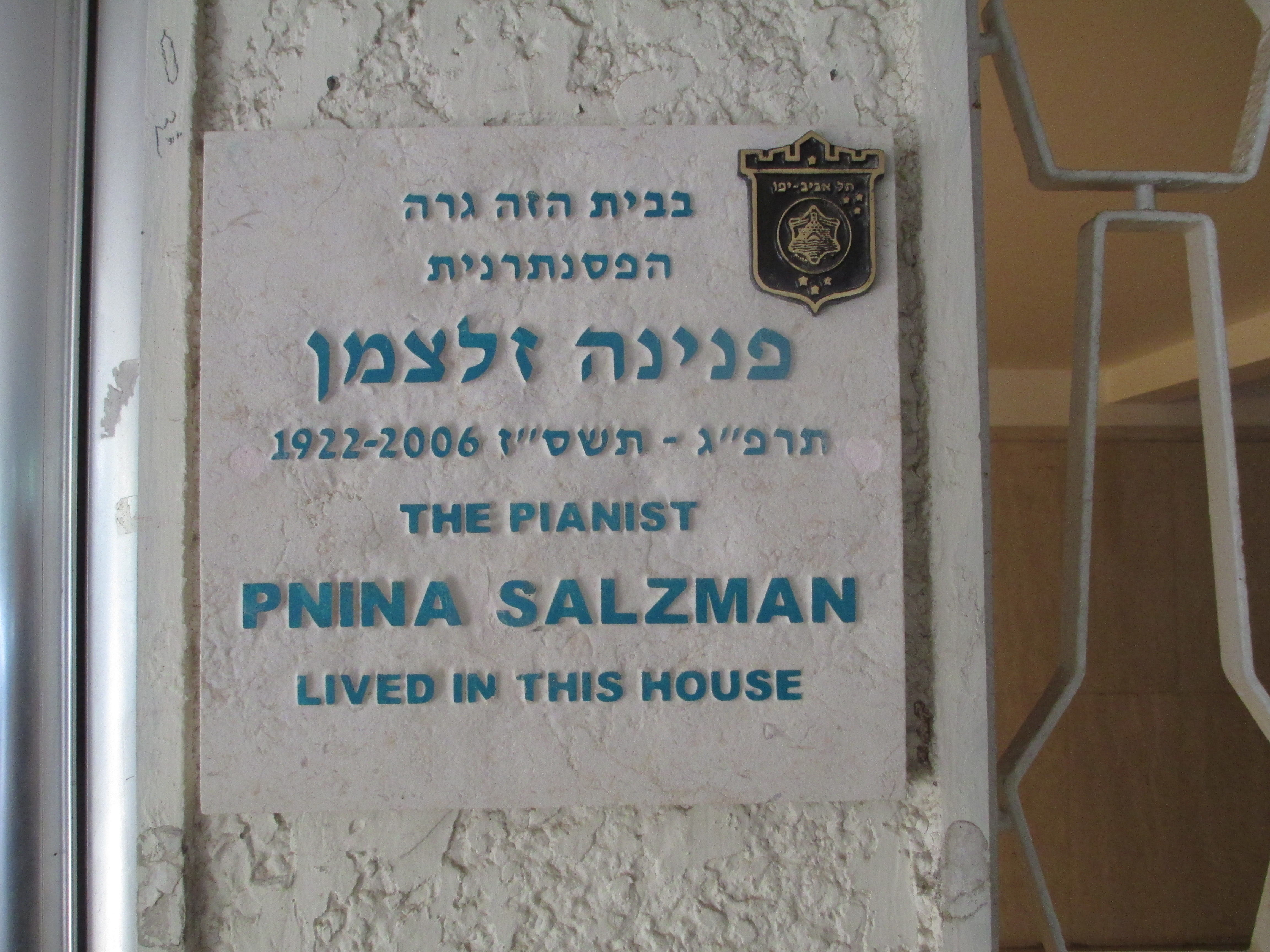 לוחית זיכרון בכניסה לביתה של הפסנתרנית פנינה זלצמן